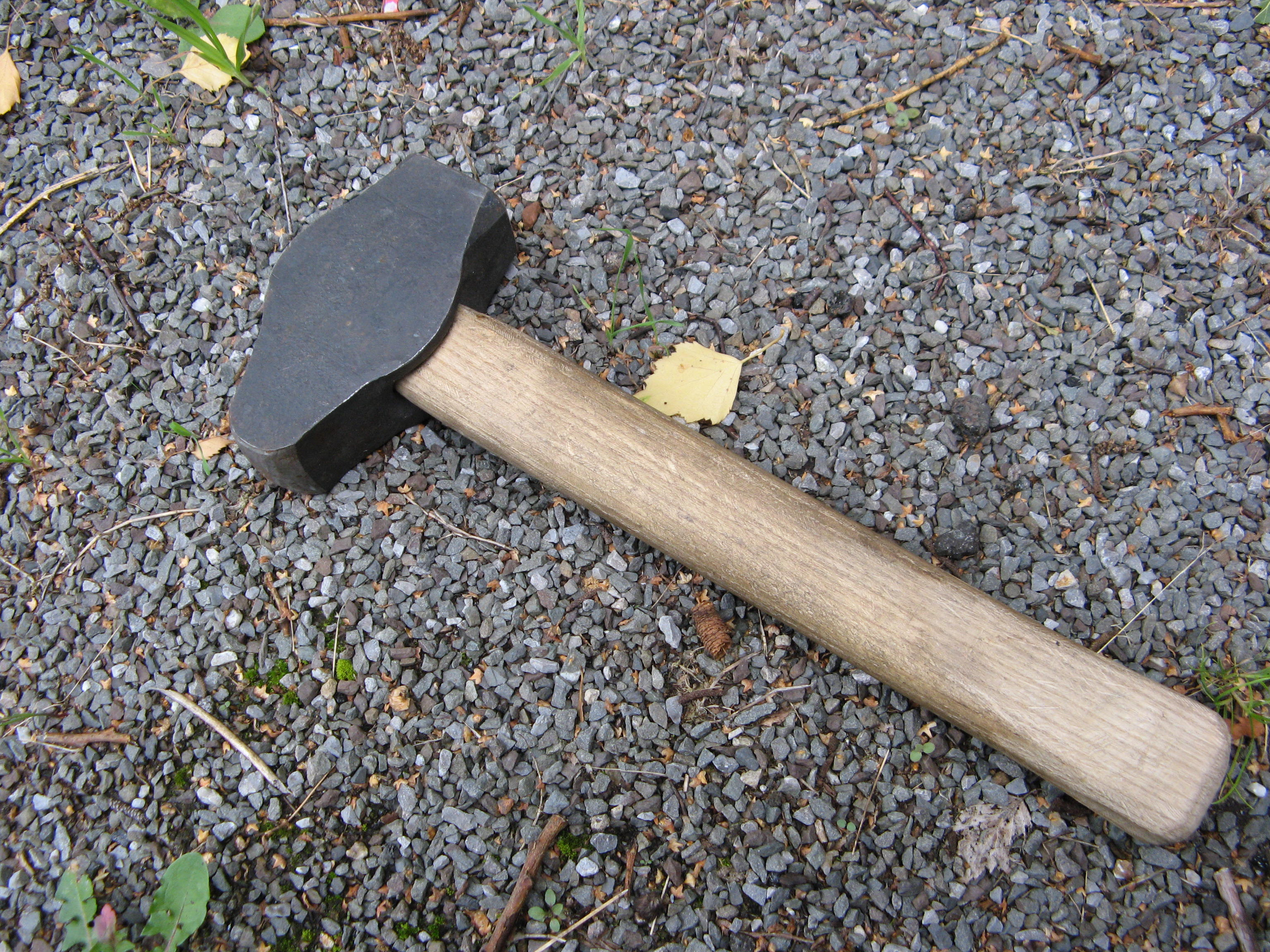 Schmiedehammer 1,5kg